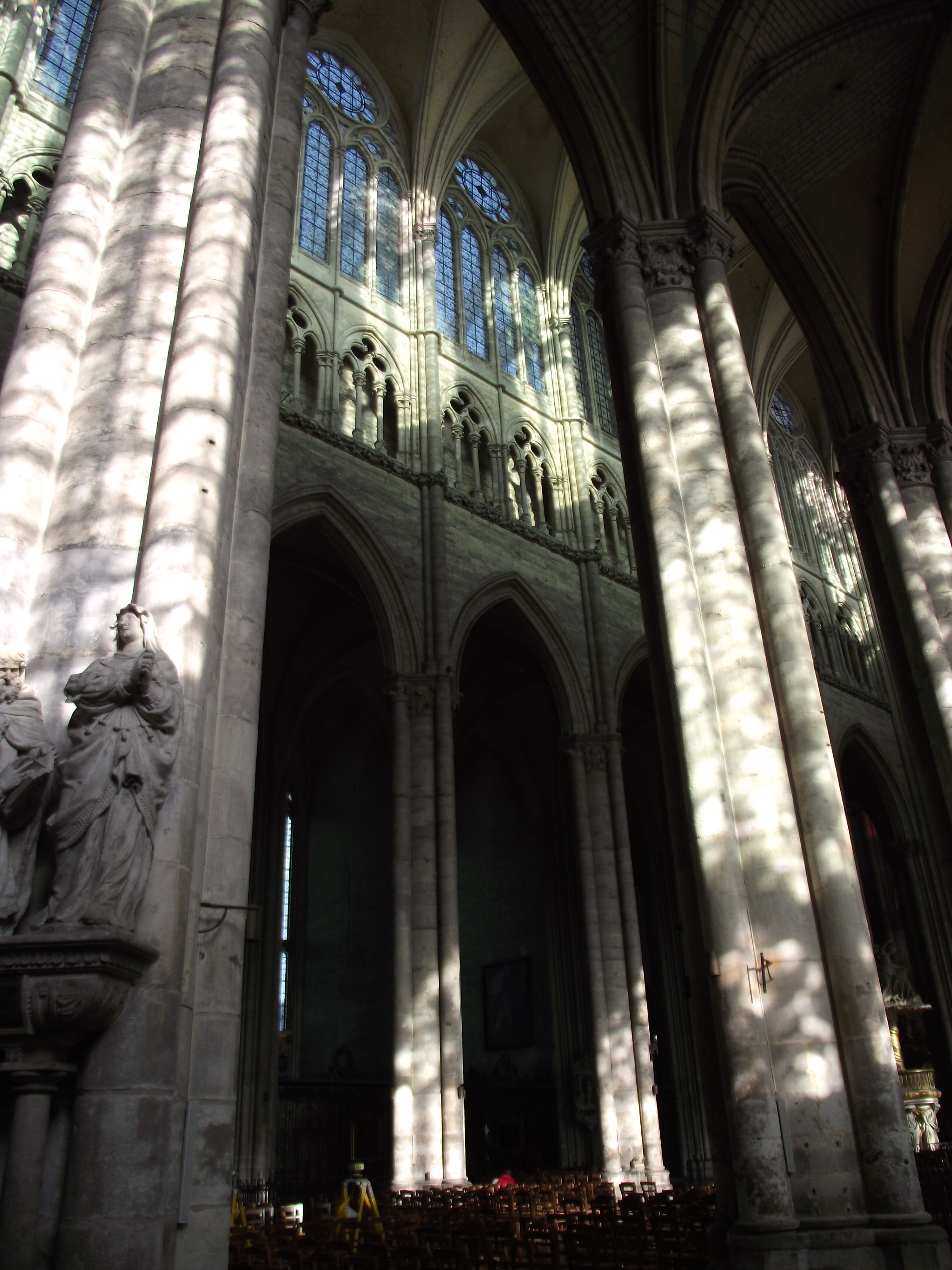 Amiens, Vue de l'intérieur de la Cathédrale